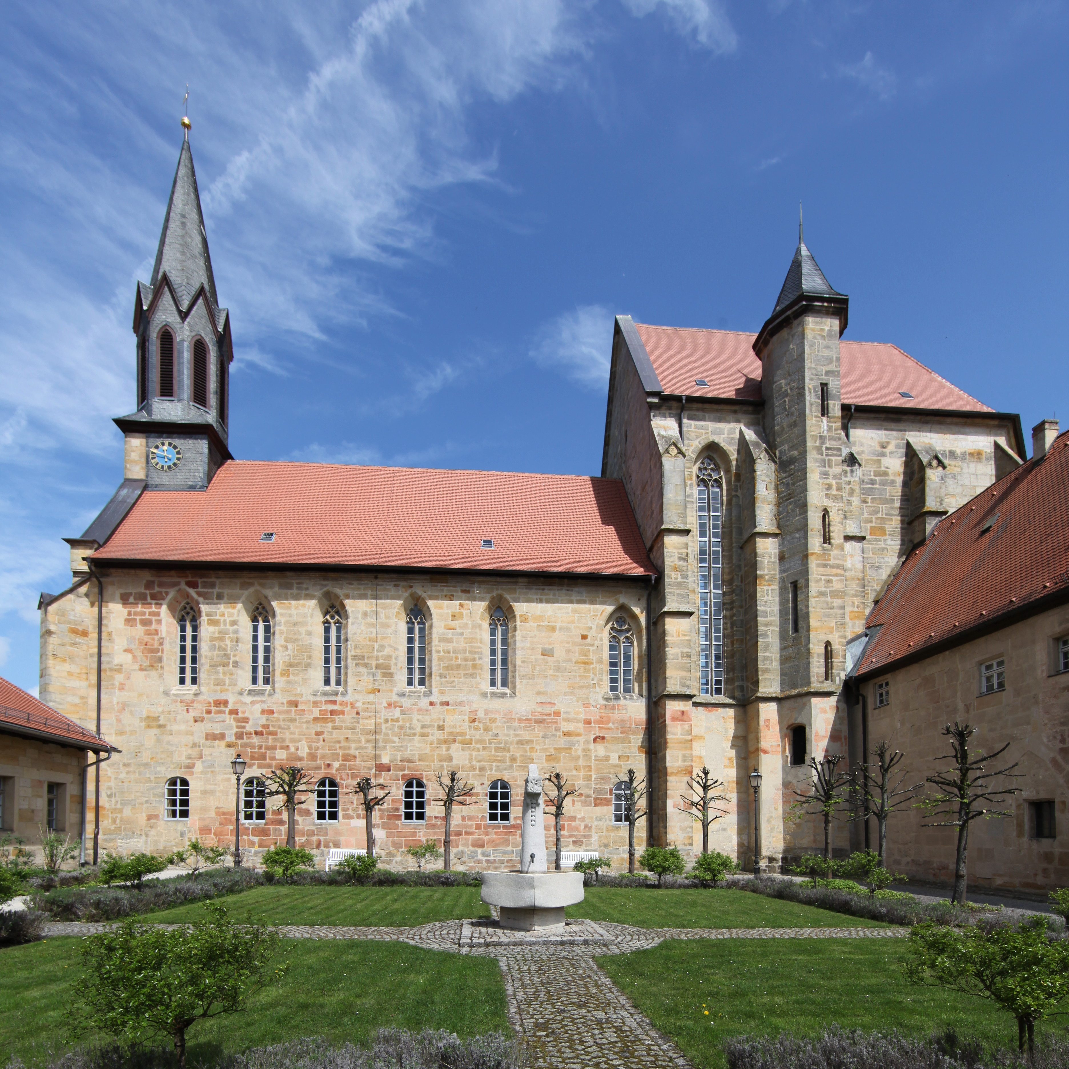 Klosterkirche in Sonnefeld, Landkreis Coburg